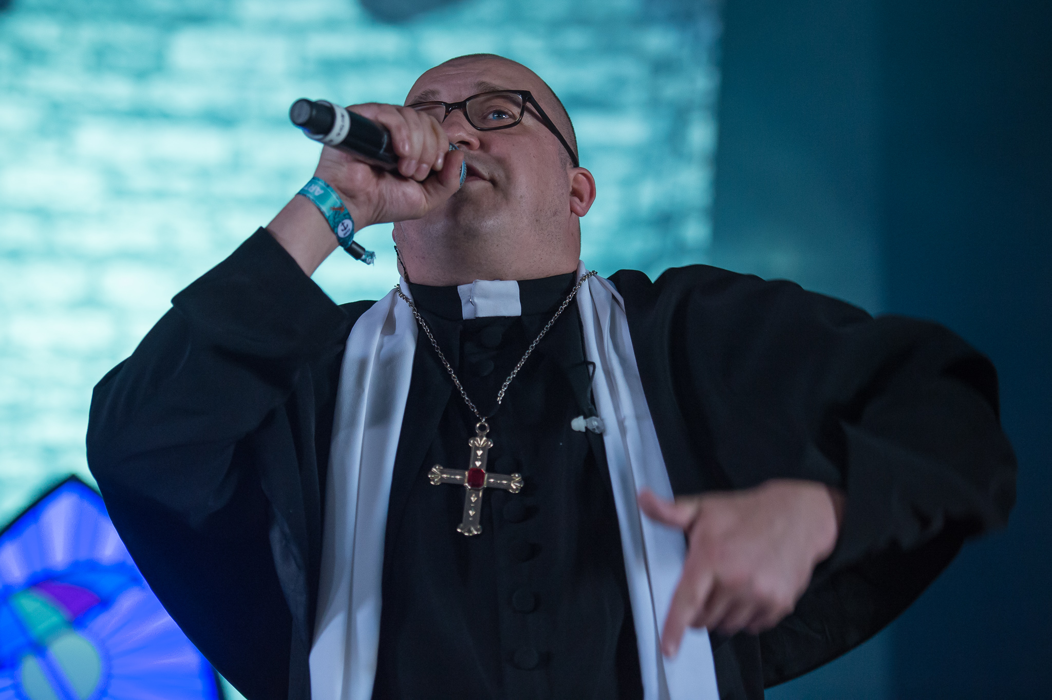 Audio88,Audio88 & Yassin,Deichbrand,ESK Events & Promotion GmbH,Festival,Konzert,Livekonzert,Livemusik,Palastzelt,Sea-Airport Cuxhaven/Nordholz,See-Flughafen Cuxhaven/Nordholz,Seeflughafen Cuxhaven/Nordholz